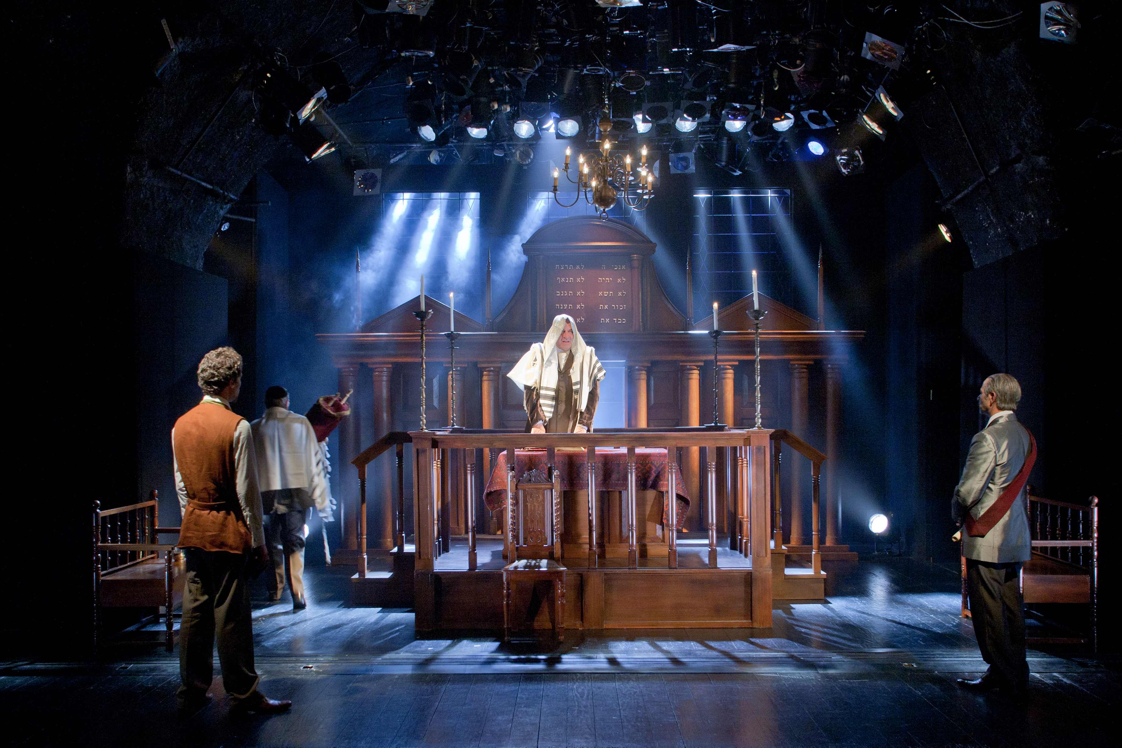 ההצגה "ירושלים החדשה" בבימויו של סיני פתר, תיאטרון החאן, 2012